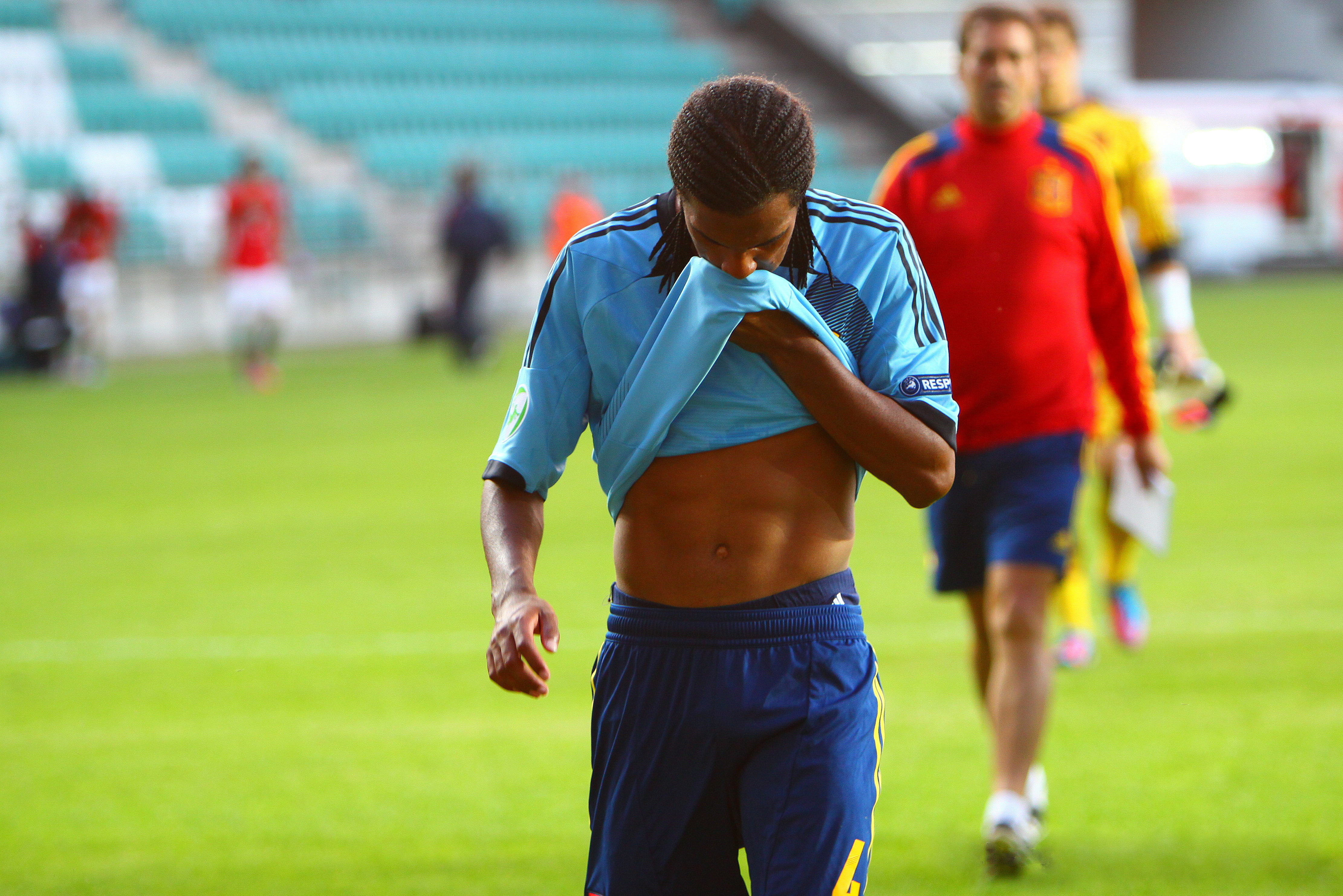 U-19 Portugal vs Spain.